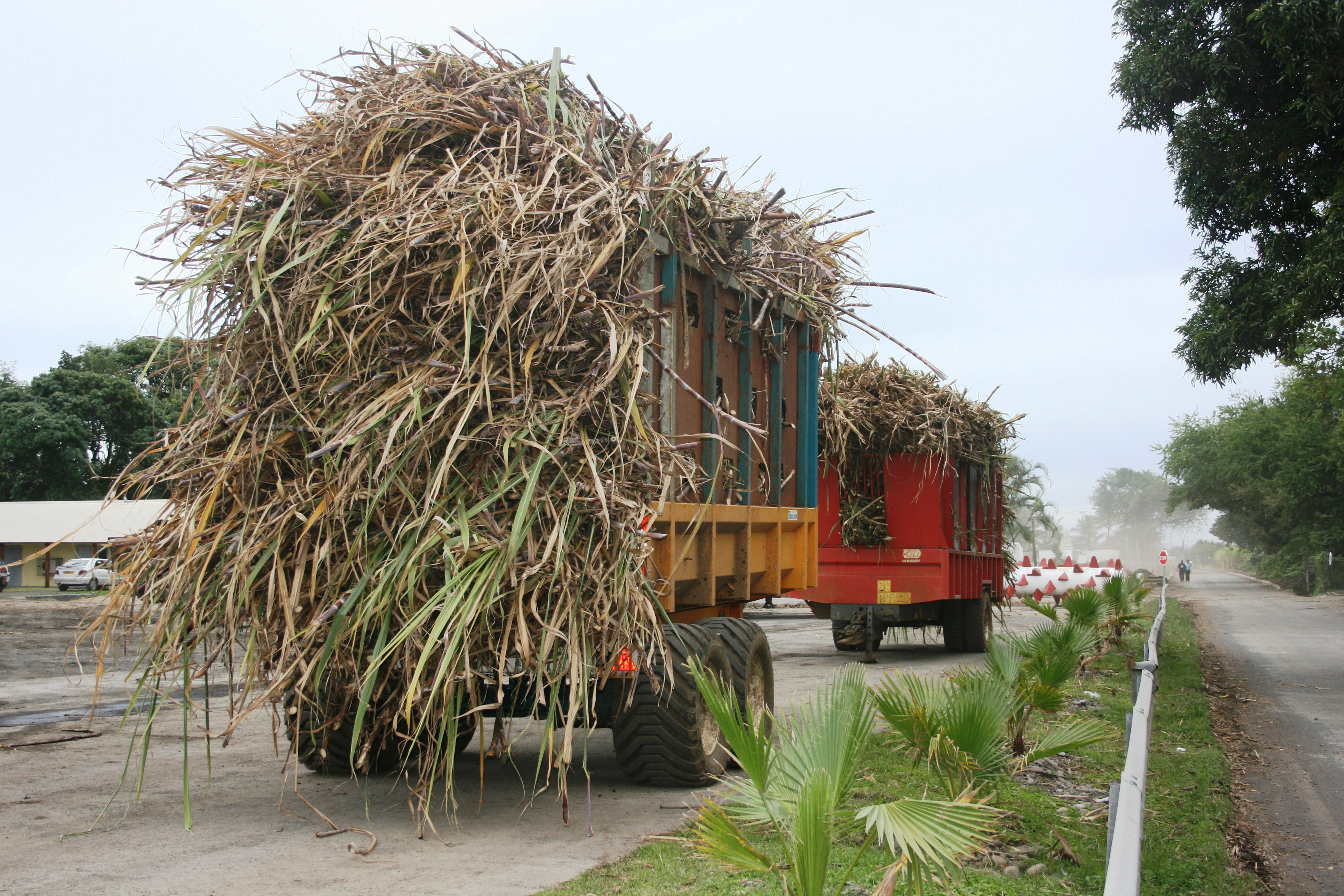 Des remorques chargées de cannes à sucre à l'usine de Beaufonds de Saint-Benoît, sur l'île de la Réunion